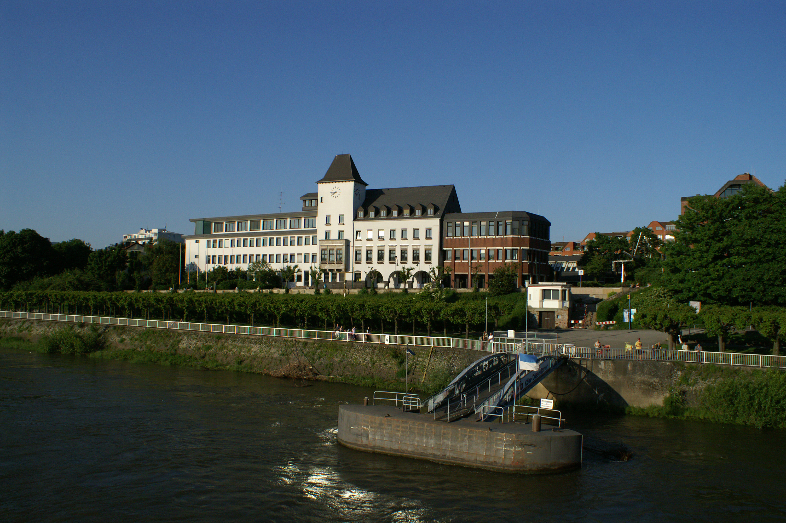 Rathaus in Köln-Porz, im Vordergrund Schiffsanleger der Köln-Düsseldorfer